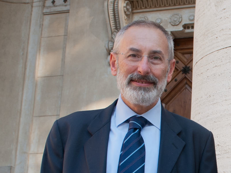 El rabino Riccardo Di Segni en la Sinagoga de Roma.